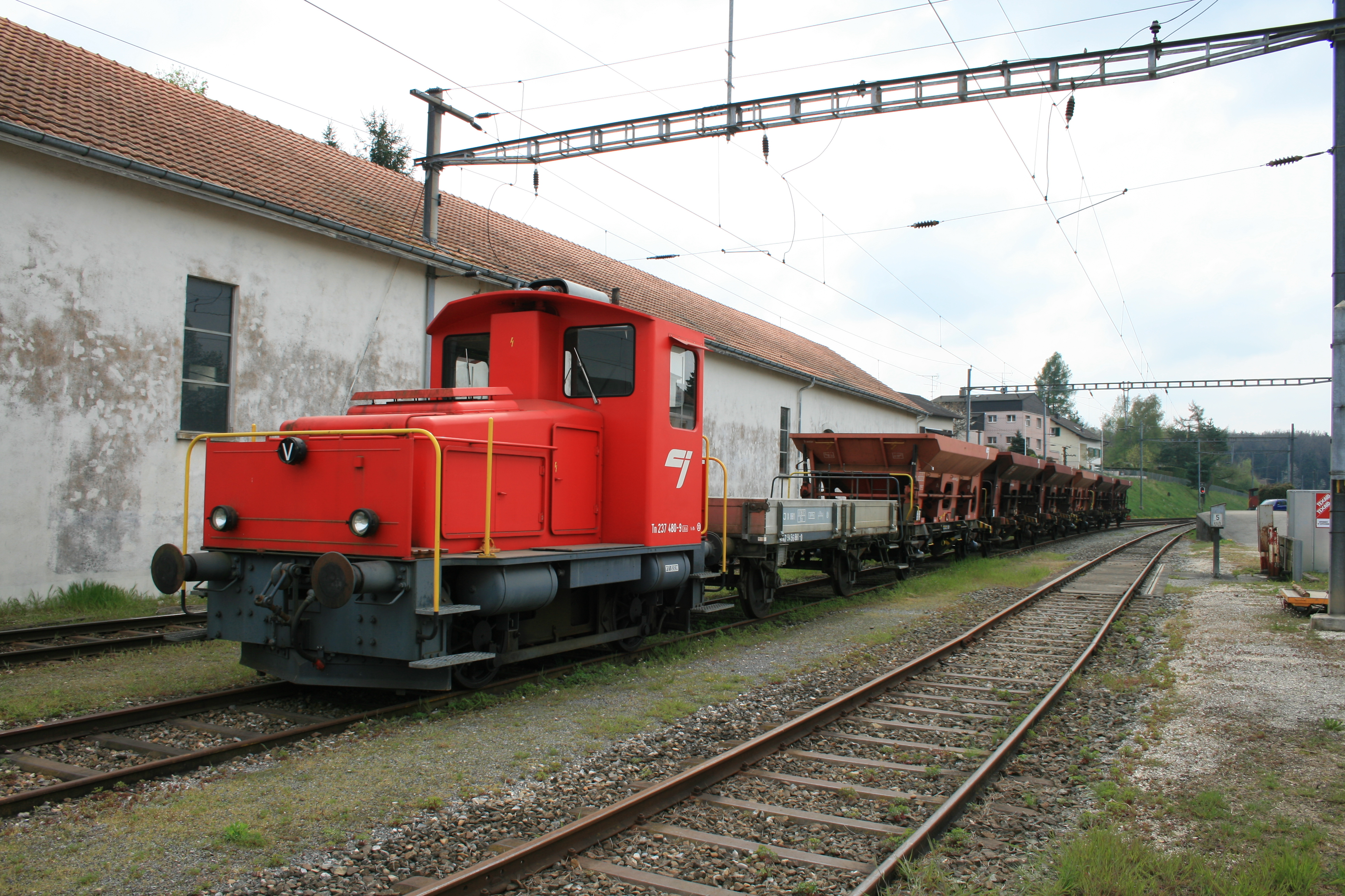 Zug der CJ im Bahnhof Bonfol JU, Schweiz